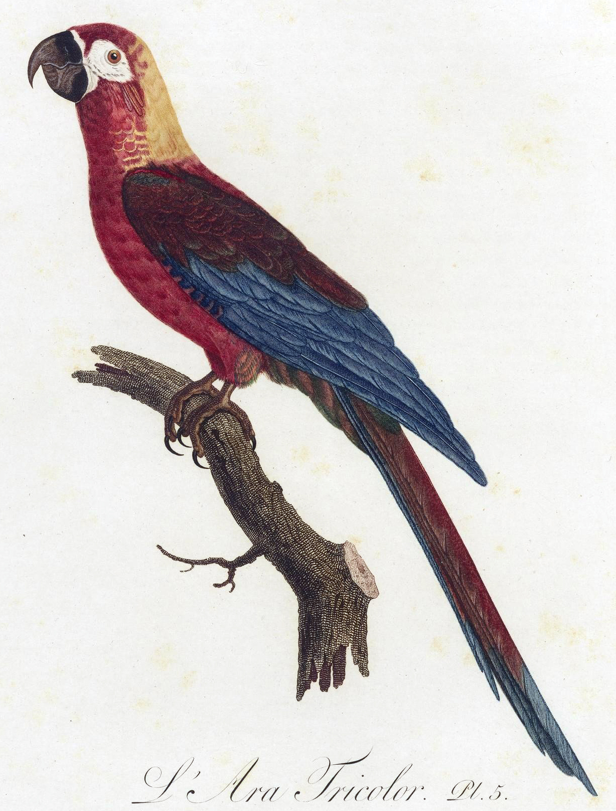 Histoire naturelle des perroquets /. A Paris :chez Levrault ... ;an IX (1801)-an XIII (1805)..